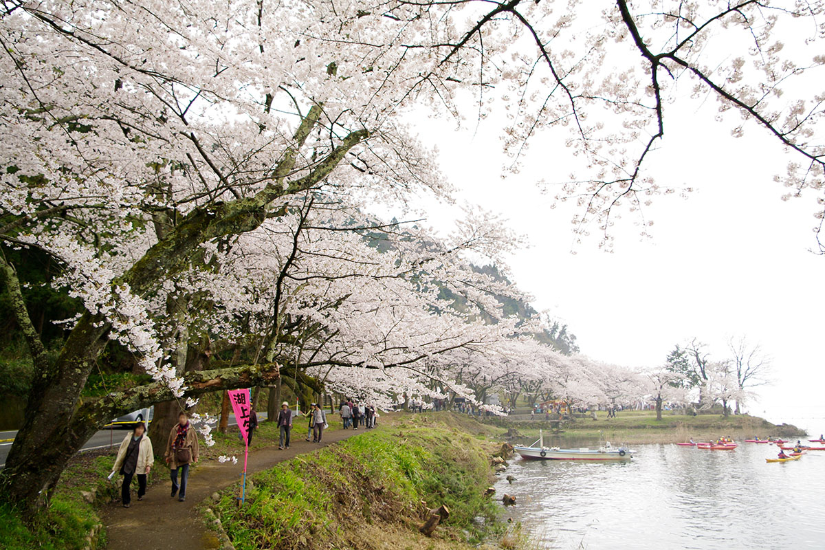 Sakura at Kaizu-Osaki, Biwa Lake (Takashima, Shiga, Japan)